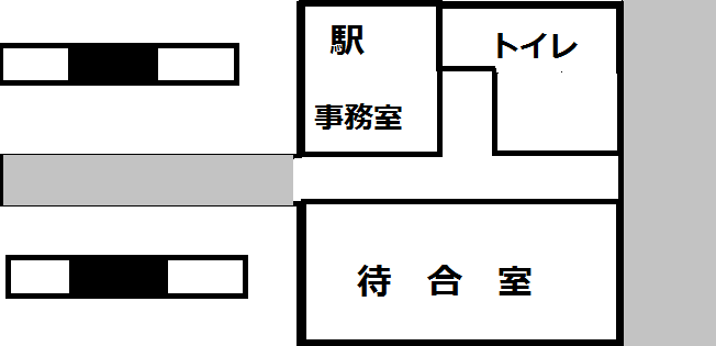 2018年7月1日以降運用の男鹿駅の構内図。 ホーム番号なし